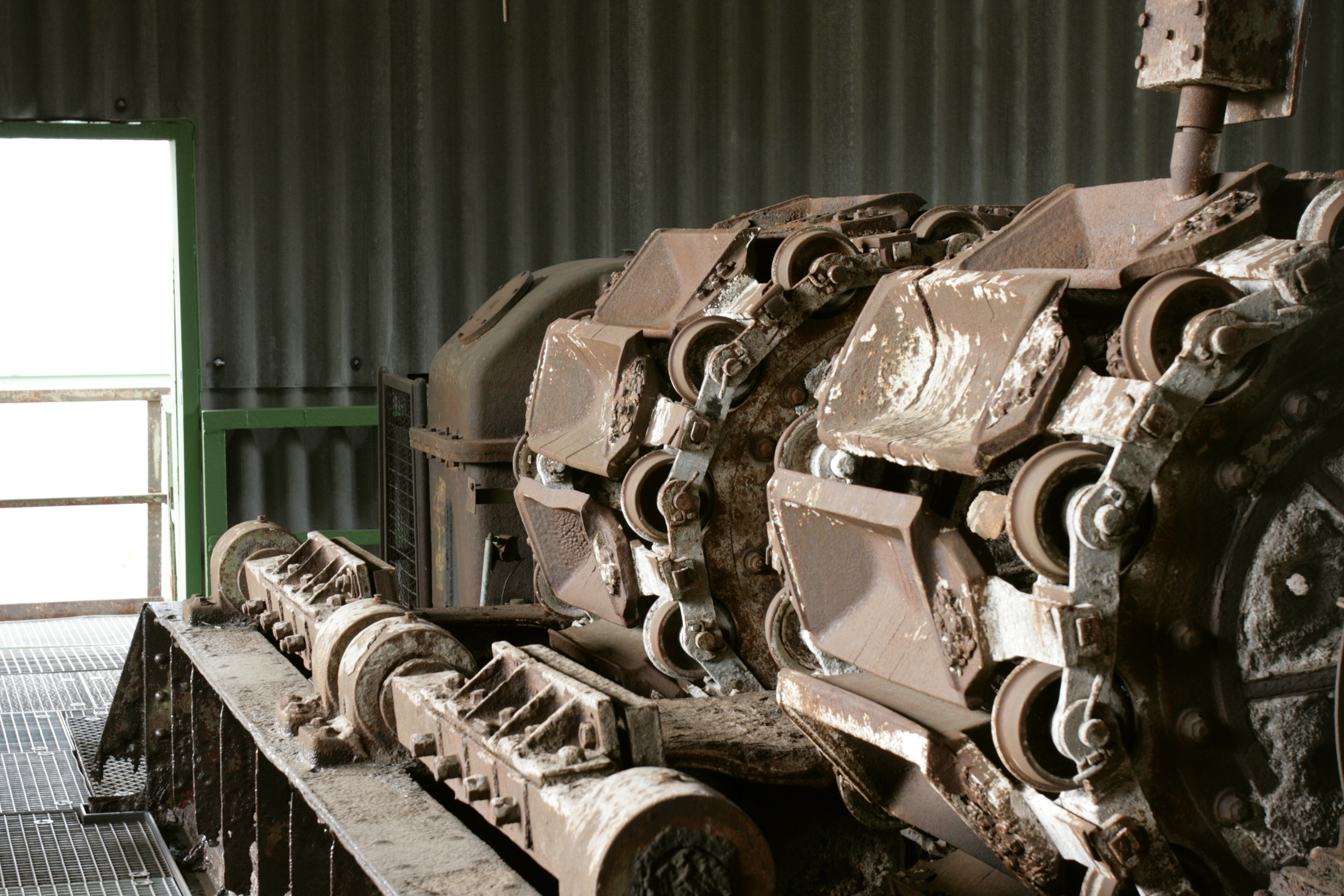 Masselgießmaschine der Henrichshütte in Hattingen